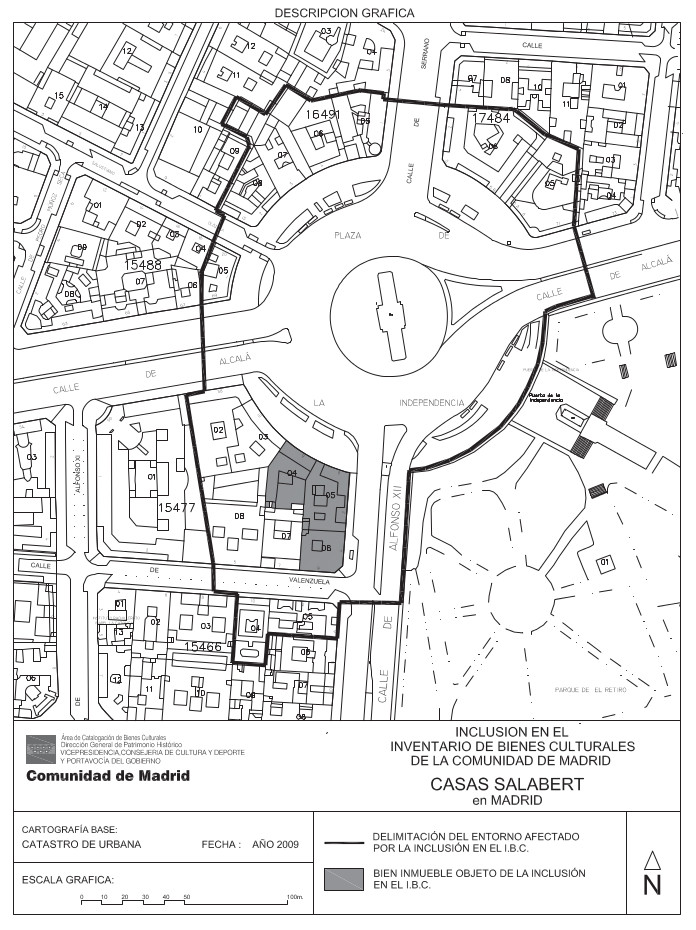 Localización del bien de interés cultural descrito en la Orden 215/2011, de 15 de febrero, por la que se incluye en el Inventario de Bienes Culturales de la Comunidad de Madrid las “Casas Salabert” de Madrid.